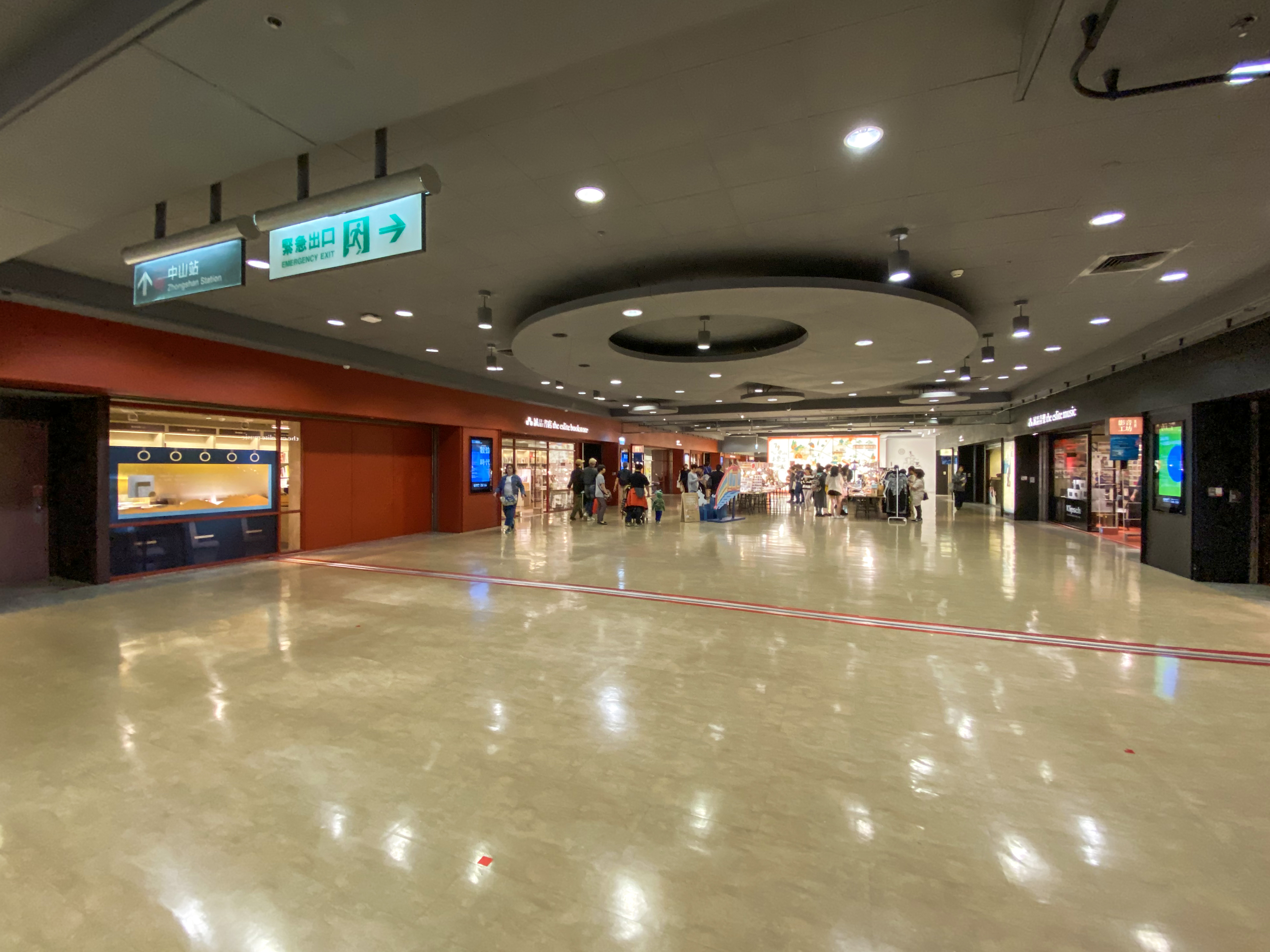 Zhongshan Metro Mall Eslite R79